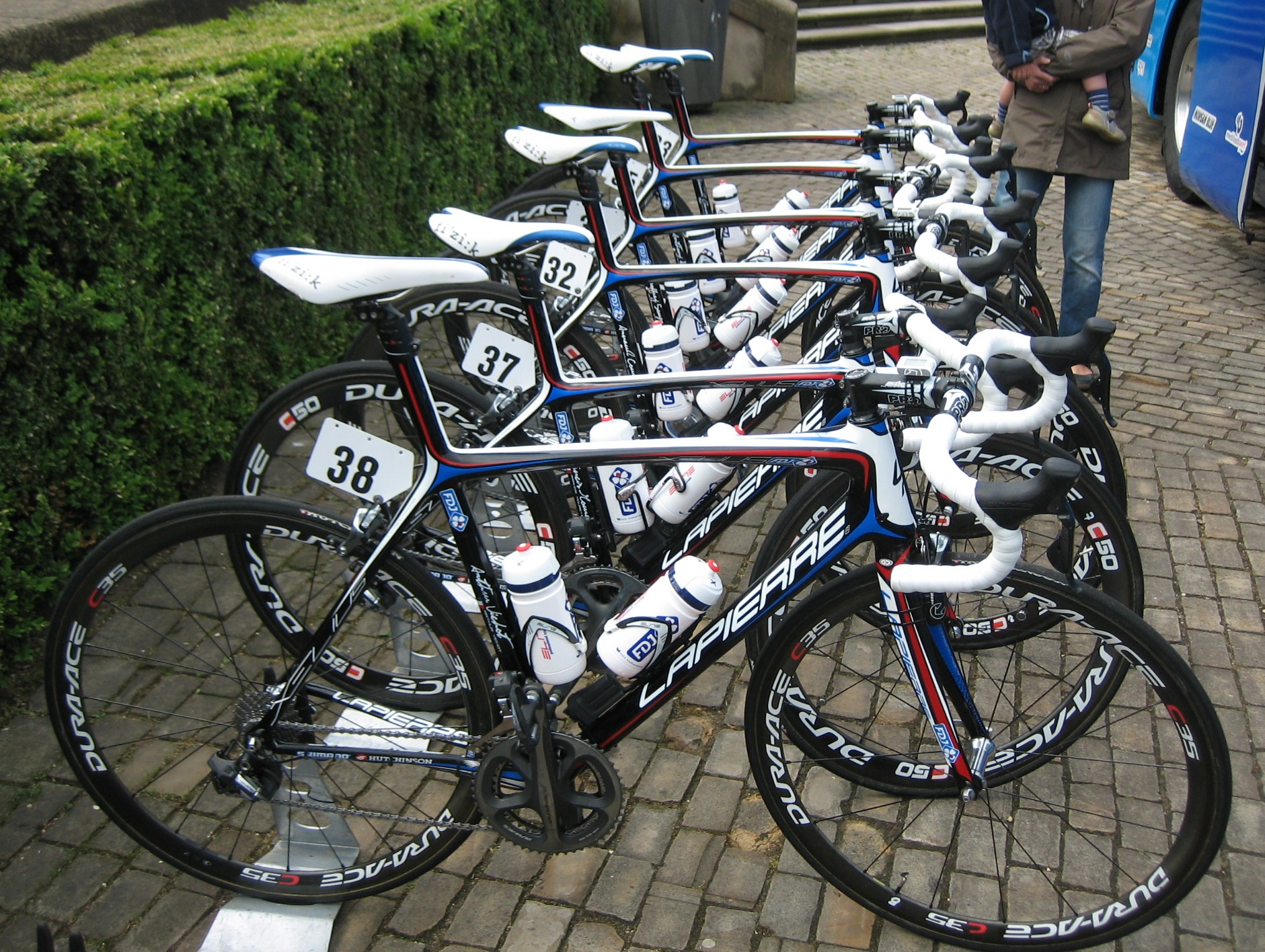 Räder des französischen Teams FDJ. Vor dem Start zur 5. Etappe der Circuit de Lorrain in Metz.